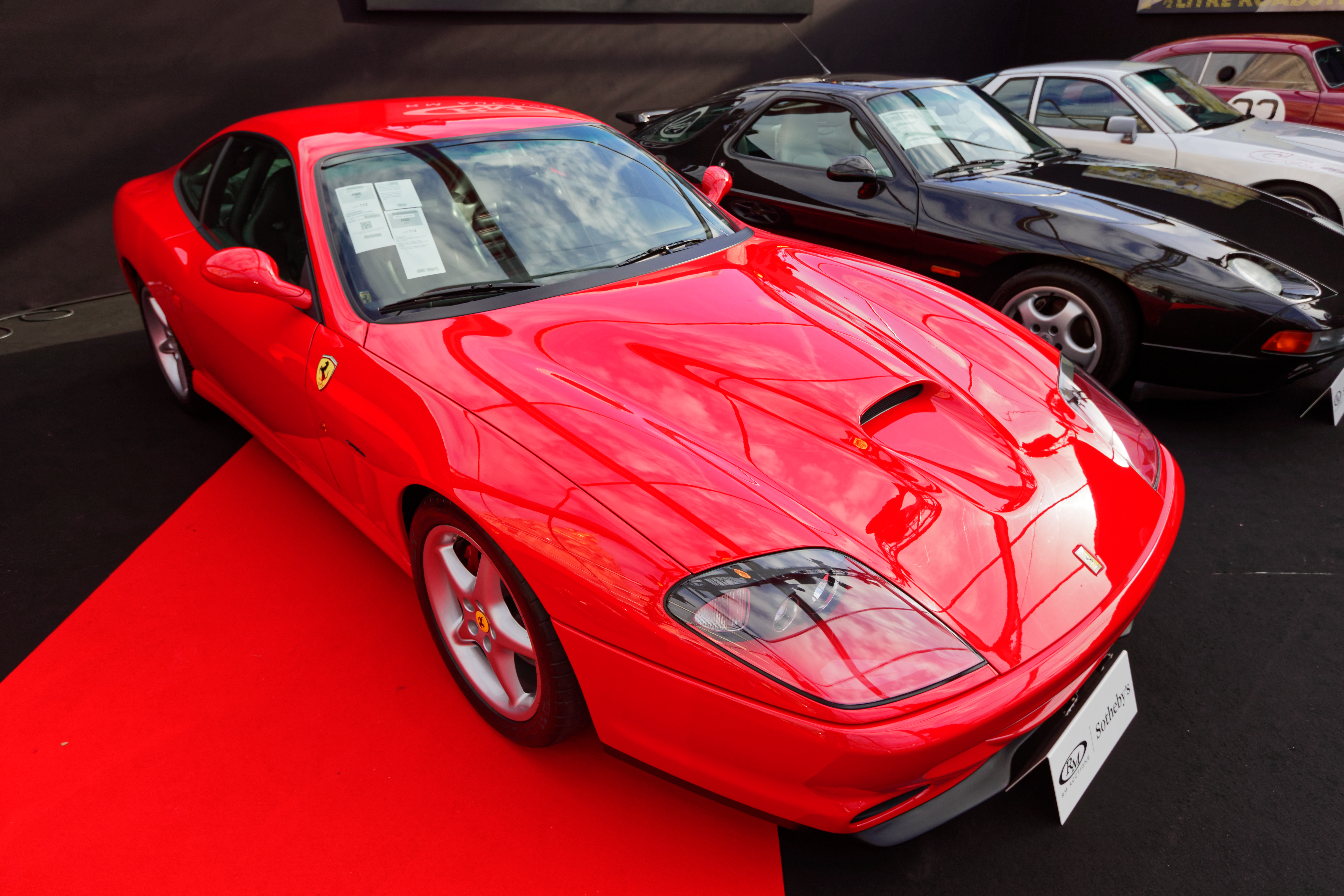 Une Ferrari 550 Maranello WSR de 2000 exposée lors de la vente RM Sotheby’s 2017 aux Invalides à Paris.